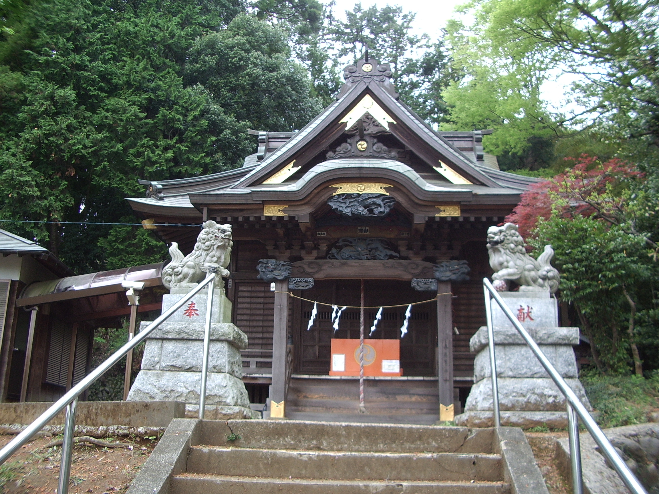 Onojinja, Machida, Tokyo